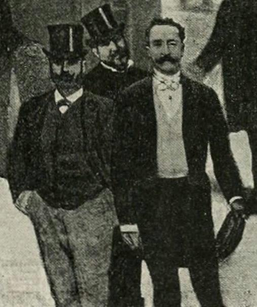 de Rodays, Magnard et Périvier. Détail d'une série de photographies du panorama le "Tout-Paris" peint par Charles Castellani et présenté lors de l'exposition universelle de 1889.